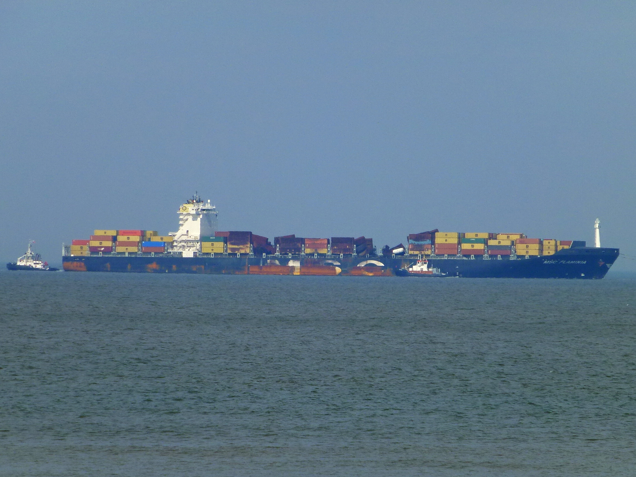 Das havarierte Containerschiff MSC Flaminia auf dem Weg nach Wilhelmshaven, hier: vor Wangerooge